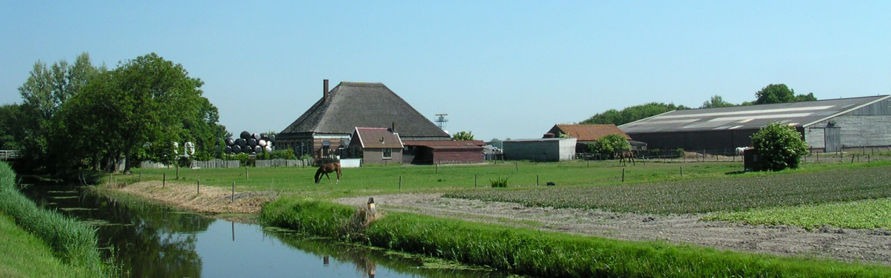 Stolpboerderij in Friese Buurt. Farm in the hamlet Friese Buurt.